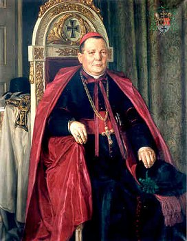 brněnský biskup Norbert Jan Nepomuk Klein